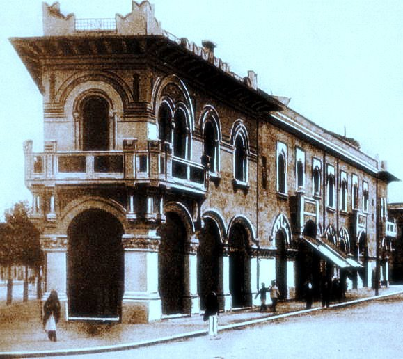 Palace Magaudda by Gino Coppedè.